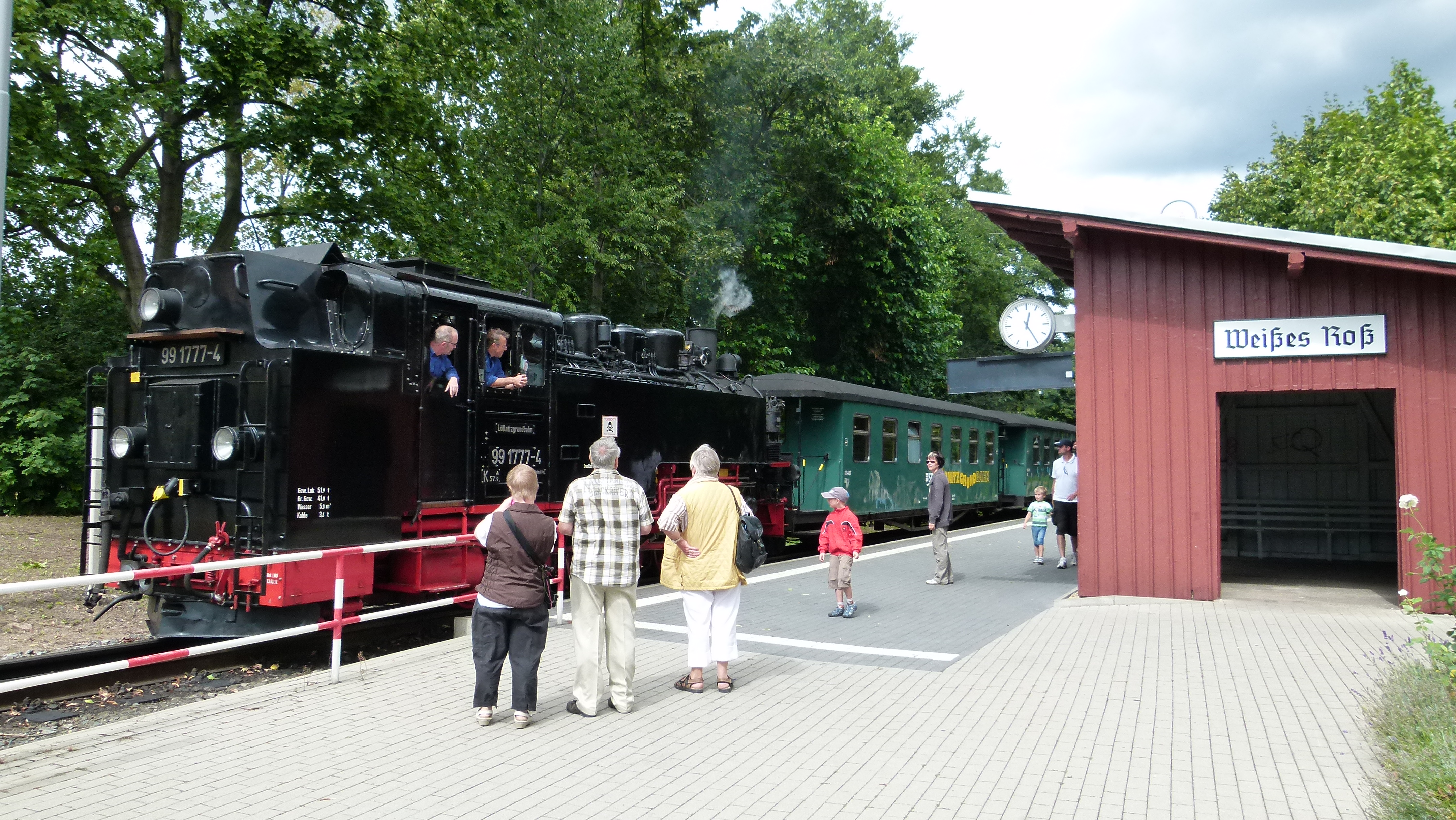 Denkmalgeschützte Kleinbahnstation, Augustusweg 2, Radebeul, Sachsen